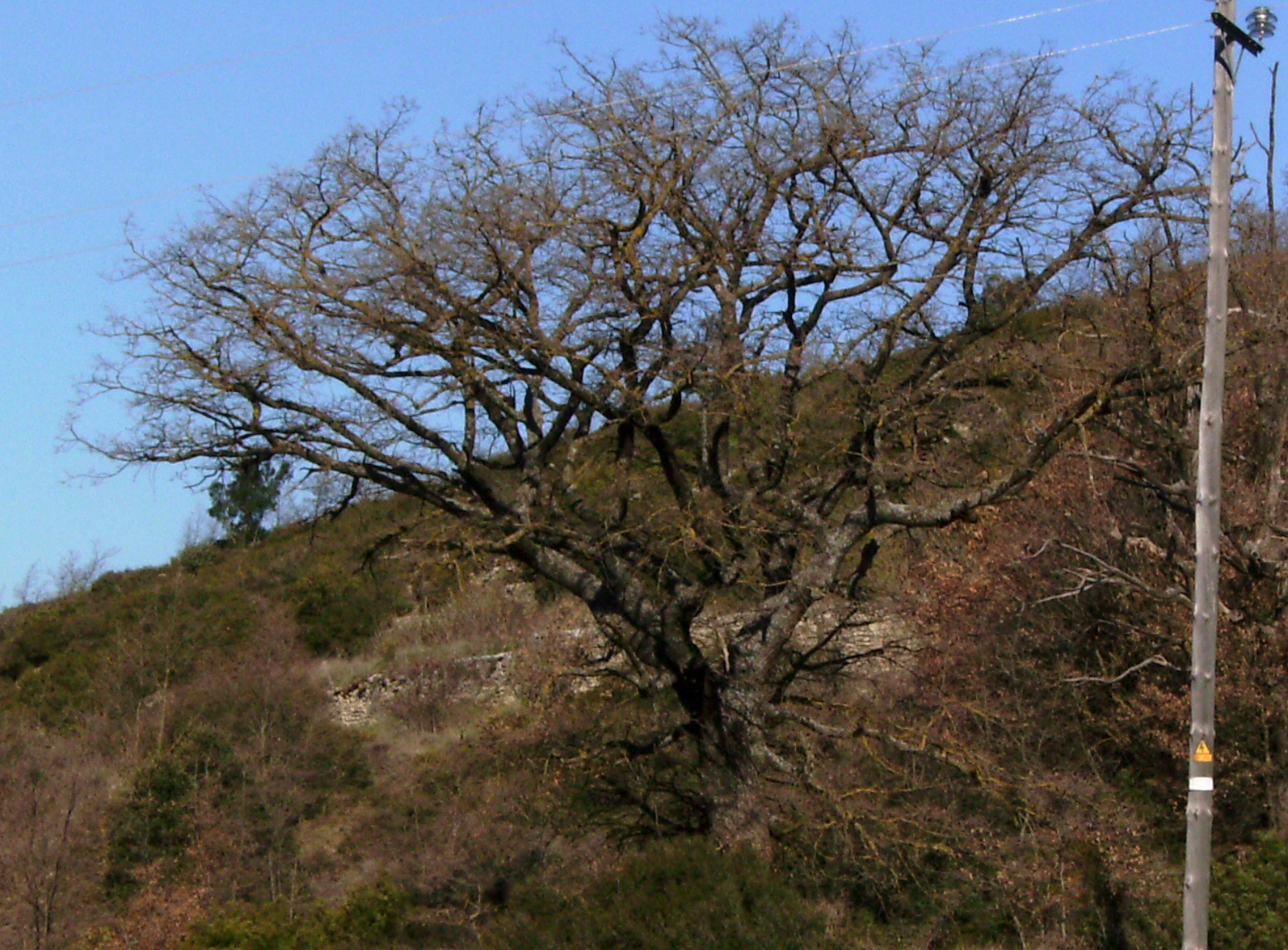 Roure híbrid sense fulles, Castelltallat, Bages